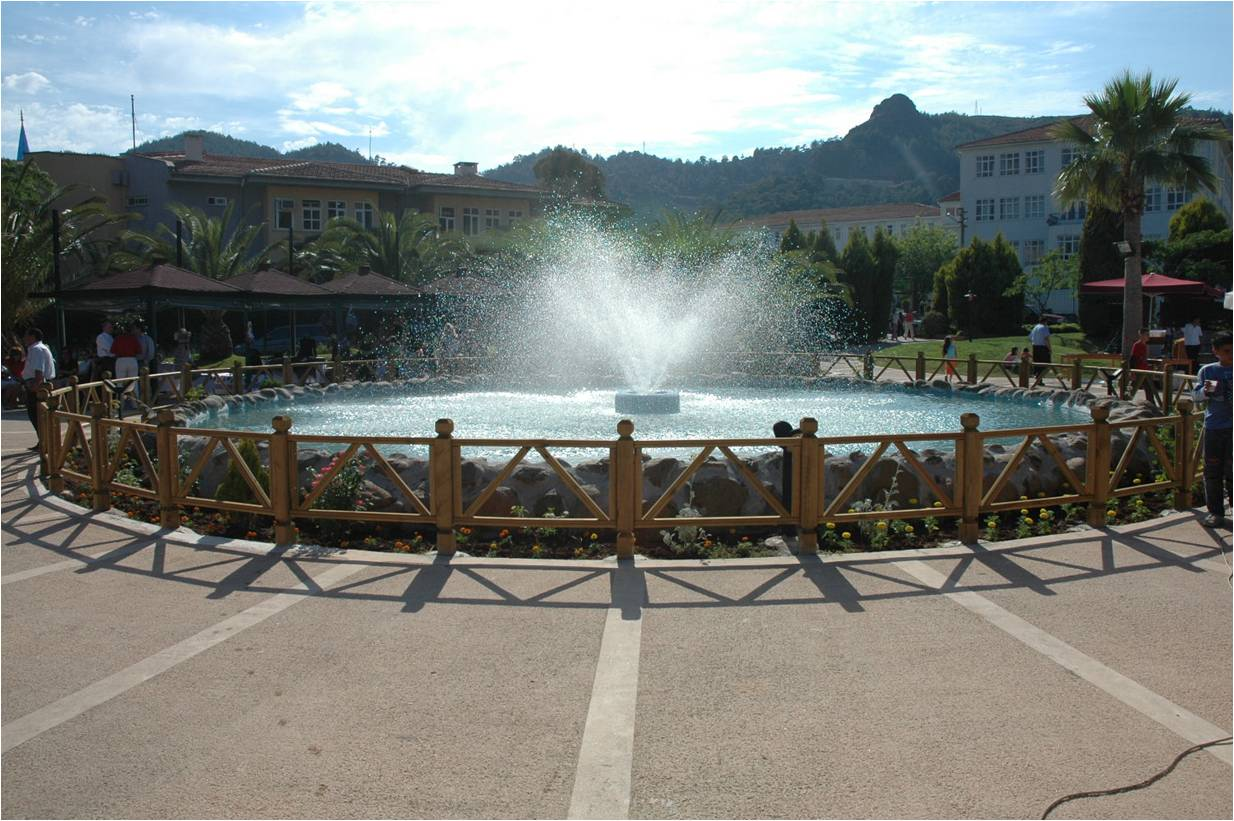 Armut Cafe